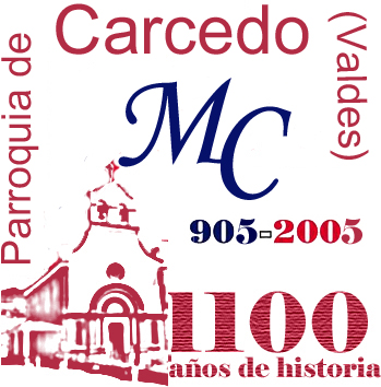 Logo conmemorativo de los 1100 años de la parroquía de Carcedo